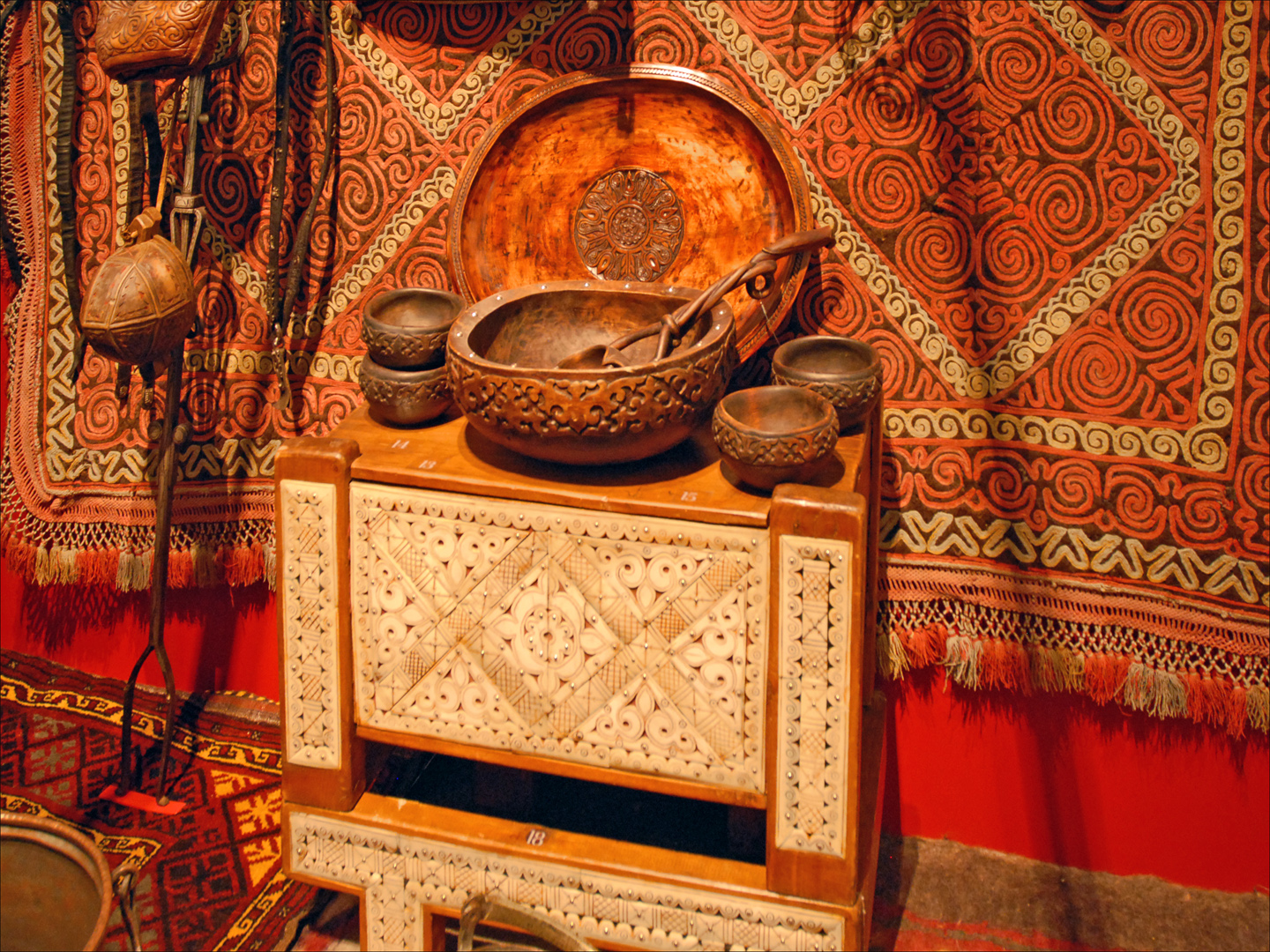 Reconstitution de l'intérieur d'une yourte Sur le coffre posé sur son socle : se trouve au centre un bol à kumys, (le kumys est une boisson faite de lait de jument fermenté) objet fait à Alma-Ata par le maître artisan G. Makeiev 1980, en bois et métal A coté, ont été placés des petits bols à kumys et à l'intérieur un puisoir à kumys Objets présentés dans l'exposition « Kazakhstan Hommes, bêtes et dieux de la steppe » au Musée Guimet, musée national des arts asiatiques jusqu'au 31 janvier 2011 Cette petite exposition qui fait découvrir la culture du Kazakhstan est à ne pas manquer, elle se termine le 31 janvier 2011 ! Les objets en or sont de petites merveilles tout comme les objets utilisés dans les yourtes ou ceux qui servent à monter à cheval, la grande spécialité de ce peuple de nomades.